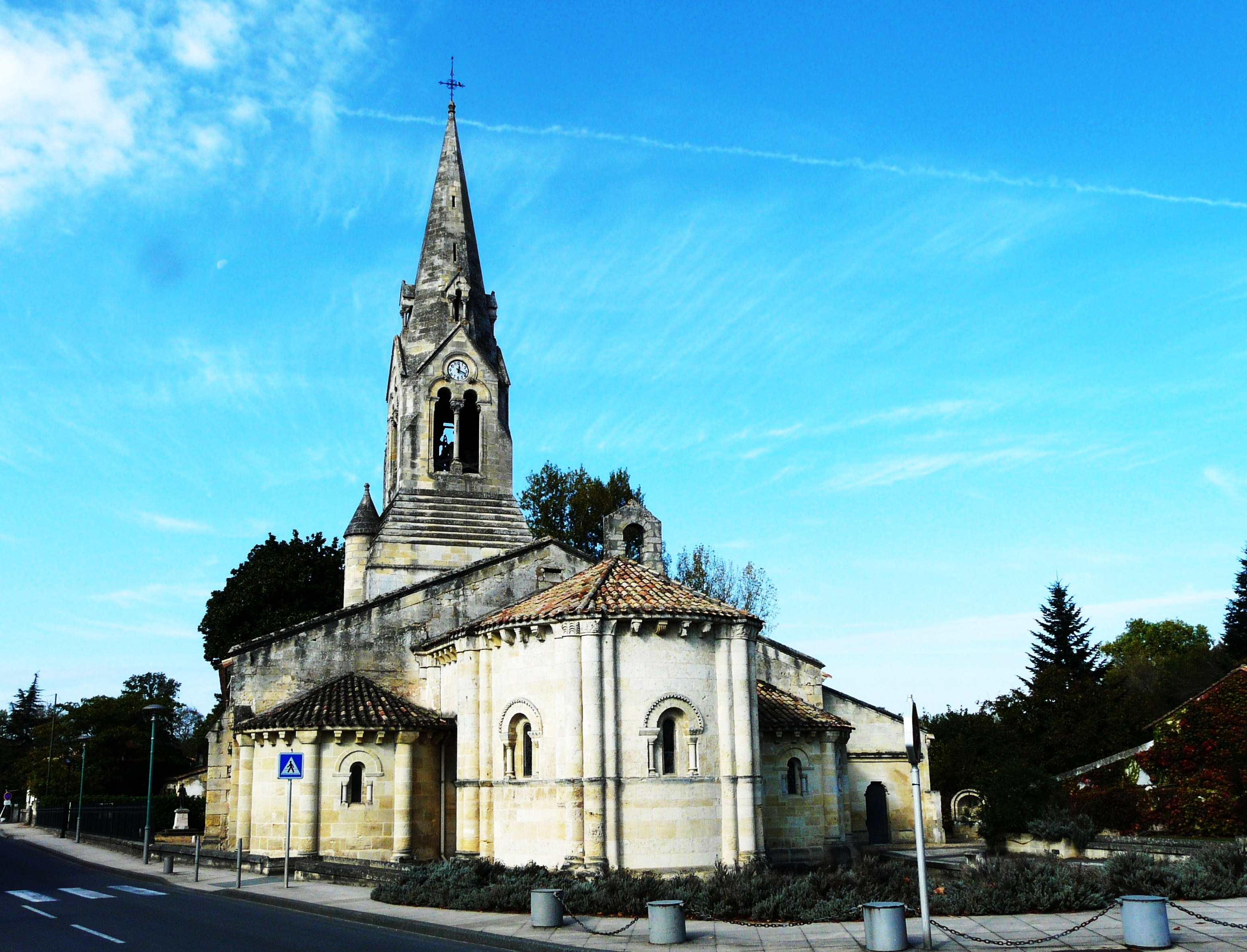 L'église Saint-Martin, Izon, Gironde, France Object location44° 55′ 16″ N, 0° 21′ 55.6″ W .